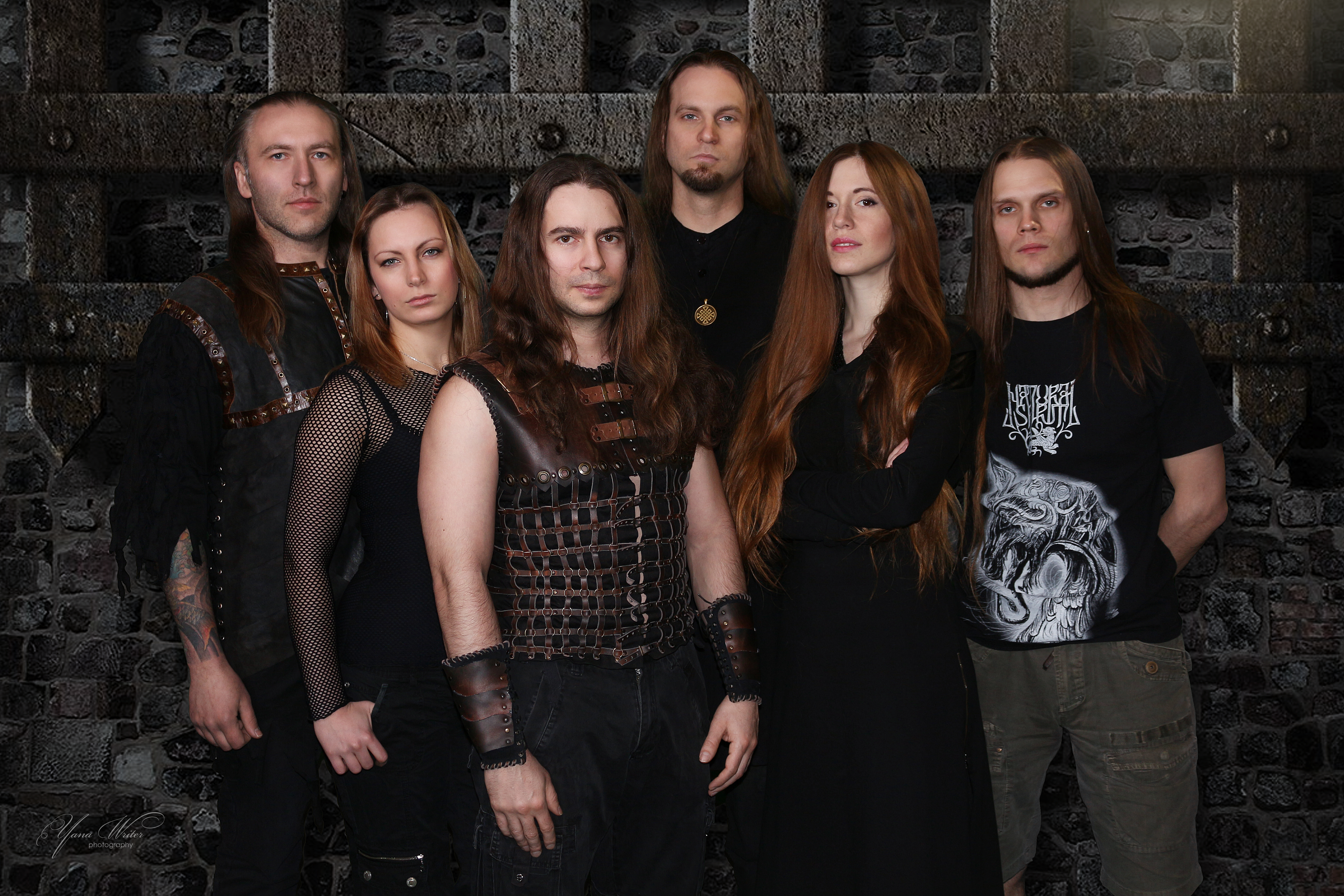 Повний склад гурту Natural Spirit станом на 2016 рік